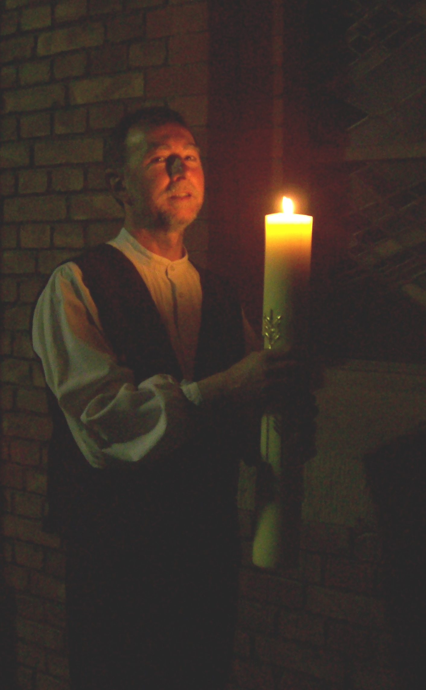 Osternachtsfeier in der Kirche der Kreuznacher Diakonie: Küster und Diakon Roland Pfeiffer mit Osterkerze beim Einzug in die Kirche